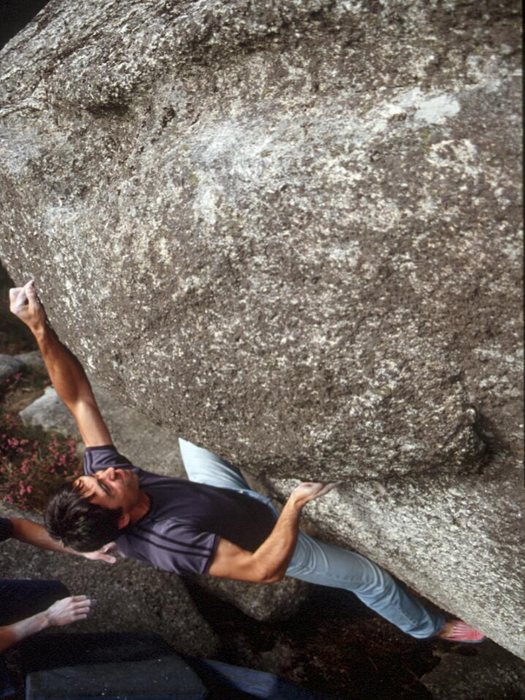 precioso bloque inaugurado hace unos añitos por el master class Tino Lois en Barredo